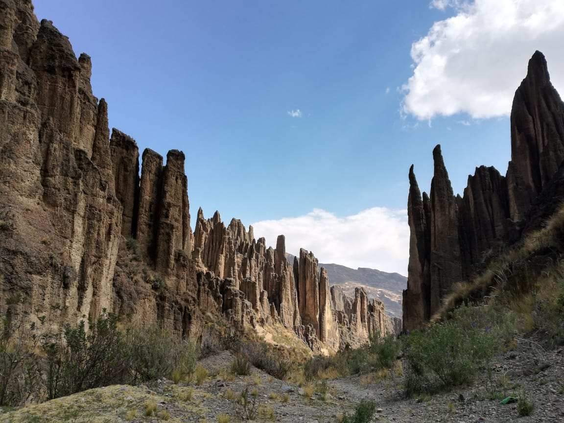 Formaciones geológicas en el Valle de las ánimas, La Paz, Bolivia, 2018